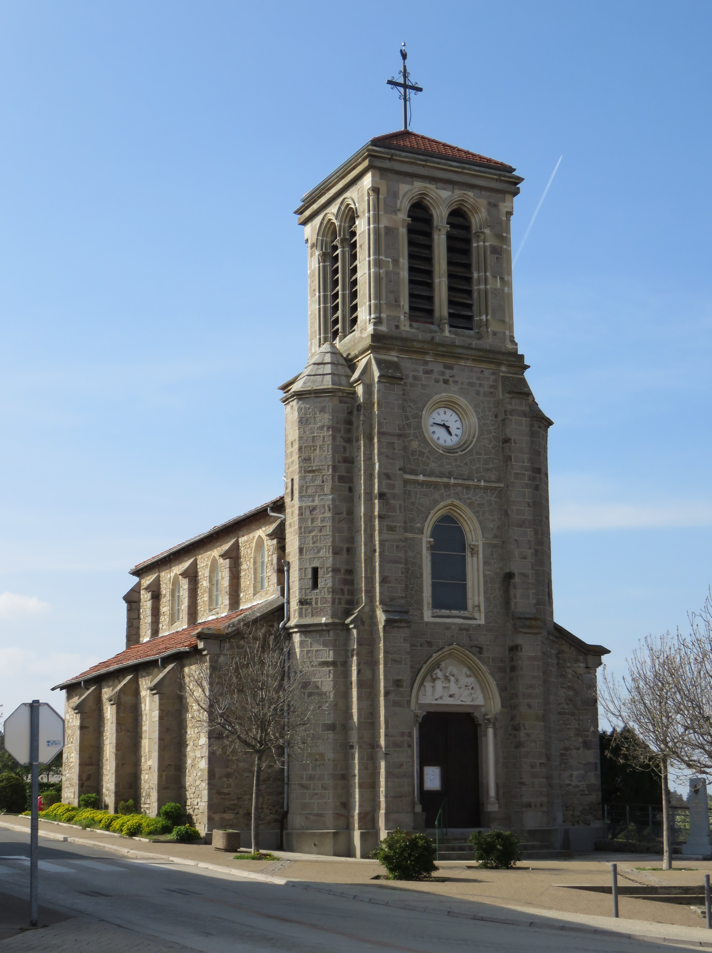 Église de Boisset, sur la commune de Boisset-Saint-Priest (Loire, France).